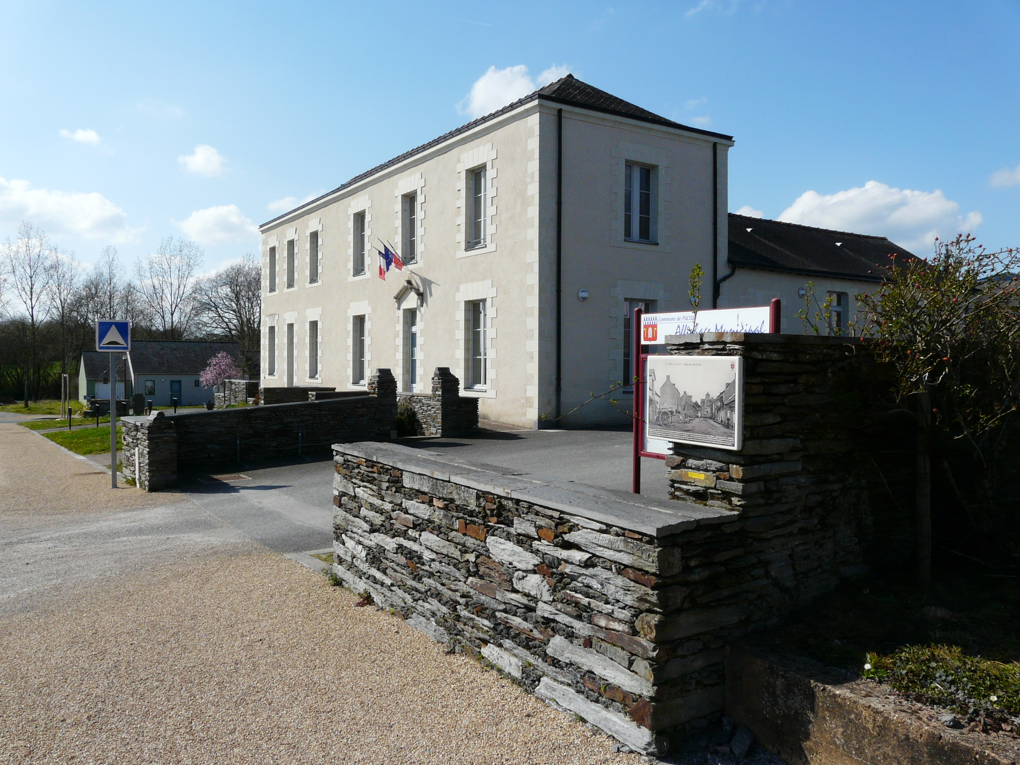 Vue d'ensemble de la Mairie de puceul